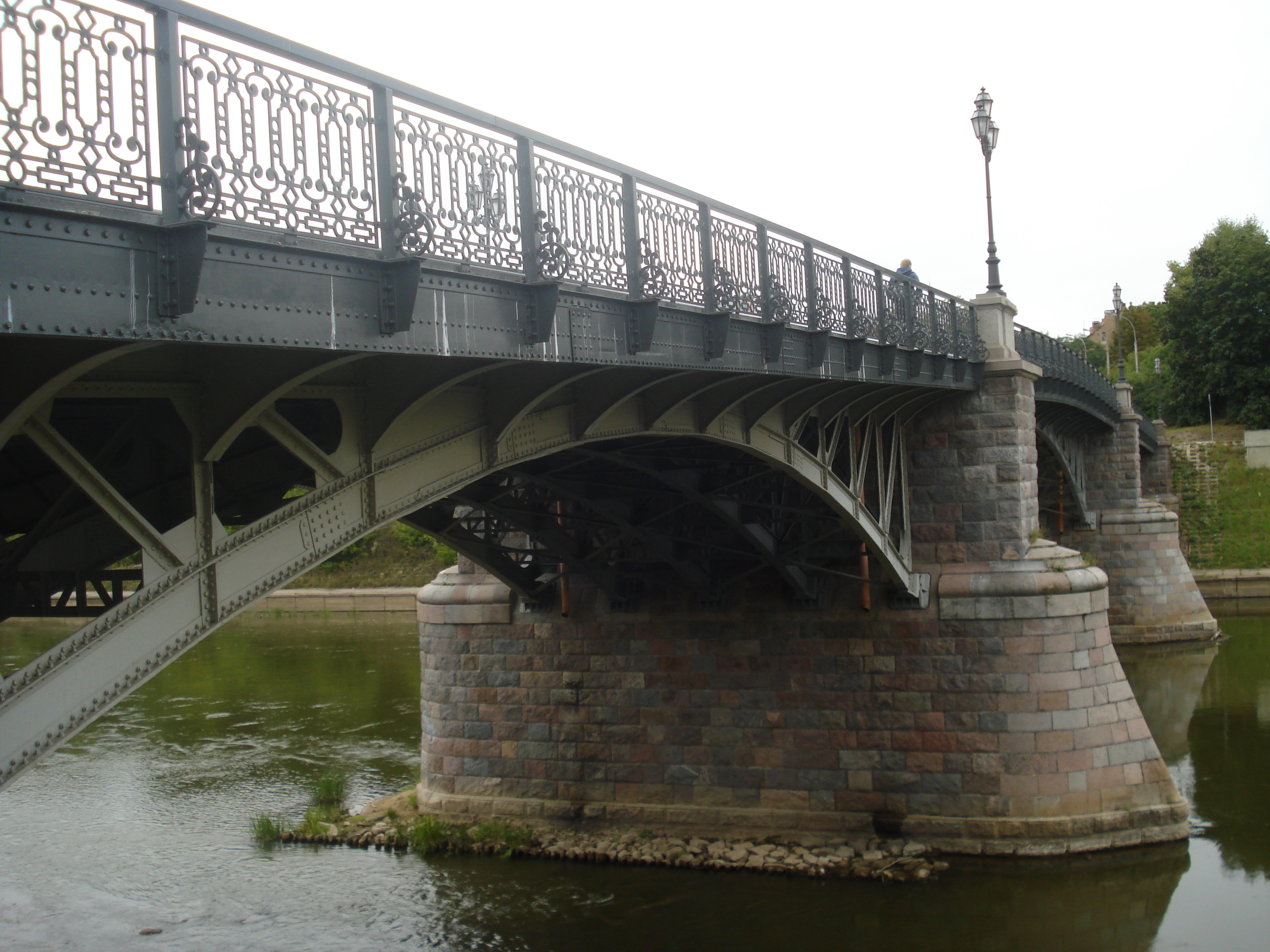 Žvėryno tiltas Vilniuje. Žvėrynas bridge in Vilnius.